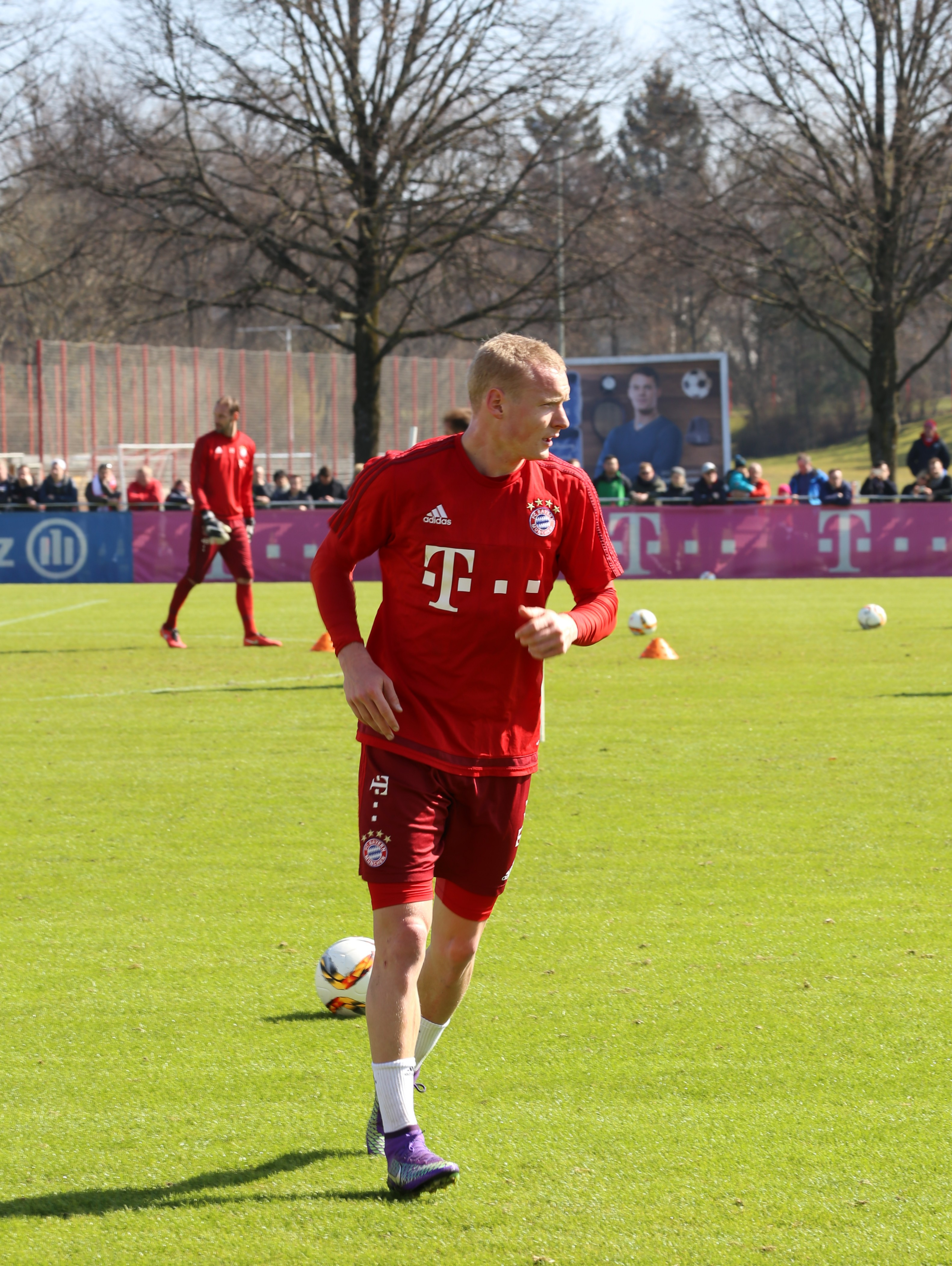 Sebastian Rode beim Training auf dem Gelände des FC Bayern München